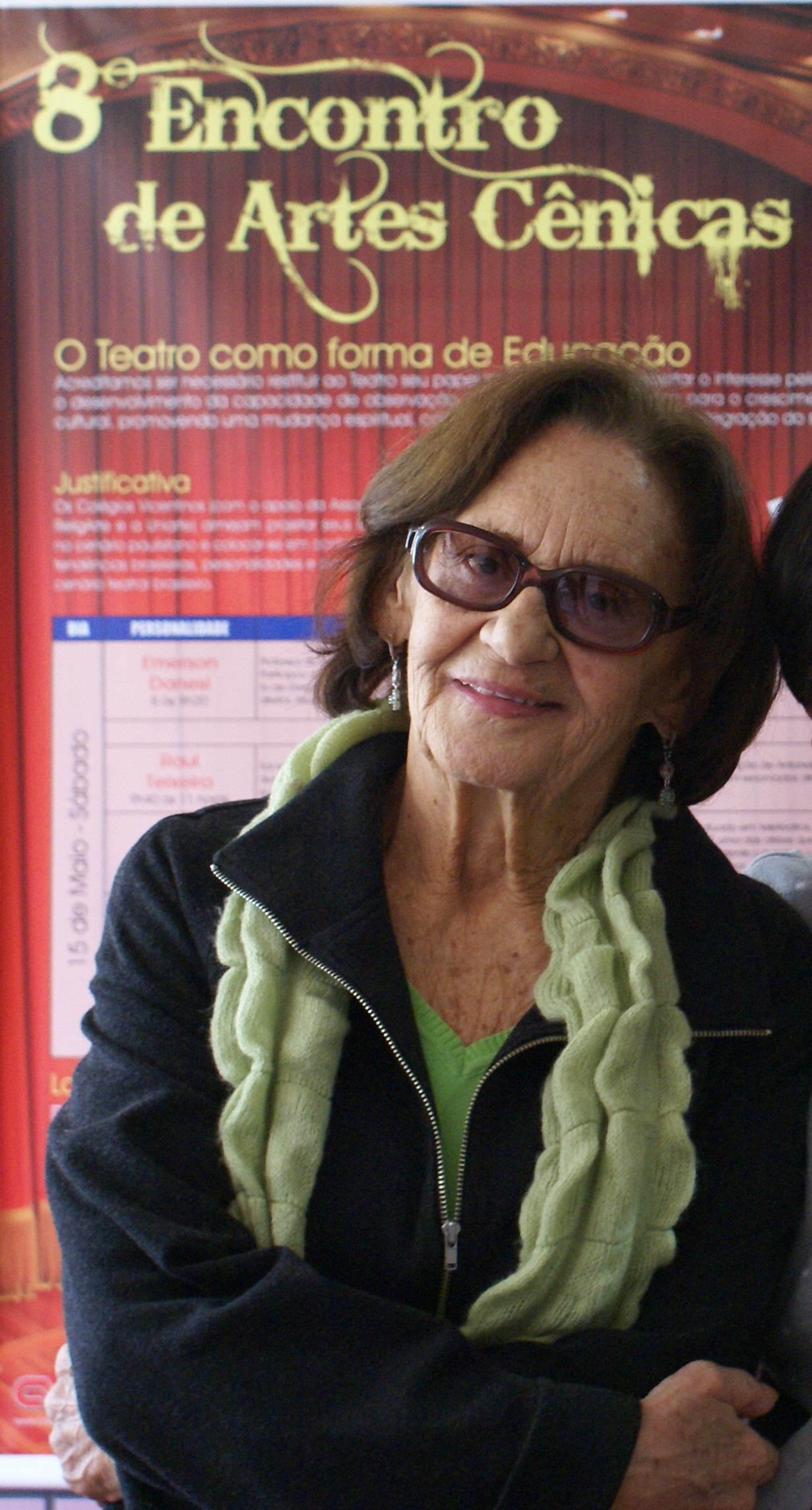 A Atriz Laura Cardoso no 8º Encontro de Artes Cênicas, no Teatro Santo Antonio, distrito do Tatuapé, em São Paulo, Brasil. - The Laura Cardoso actress, in 8º Encontro de Artes Cênicas, in Santo Antonio Theather, Tatuapé district, in São Paulo City, Brazil.